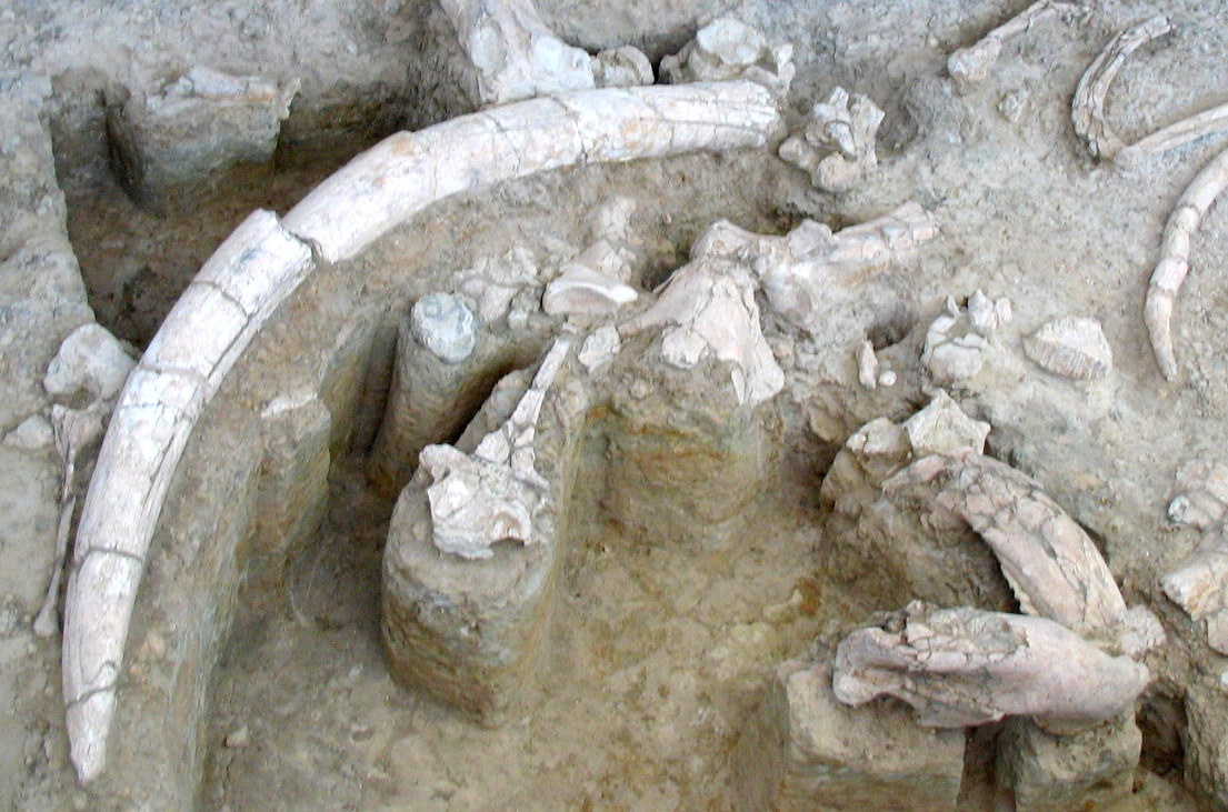 Fósiles de Palaeoloxodon antiquus. Defensa (izquierda de la imagen), vértebra (centro), mandíbula (derecha), etc. en el yacimiento paleontológico del Pleistoceno medio de Ambrona (Soria, España).